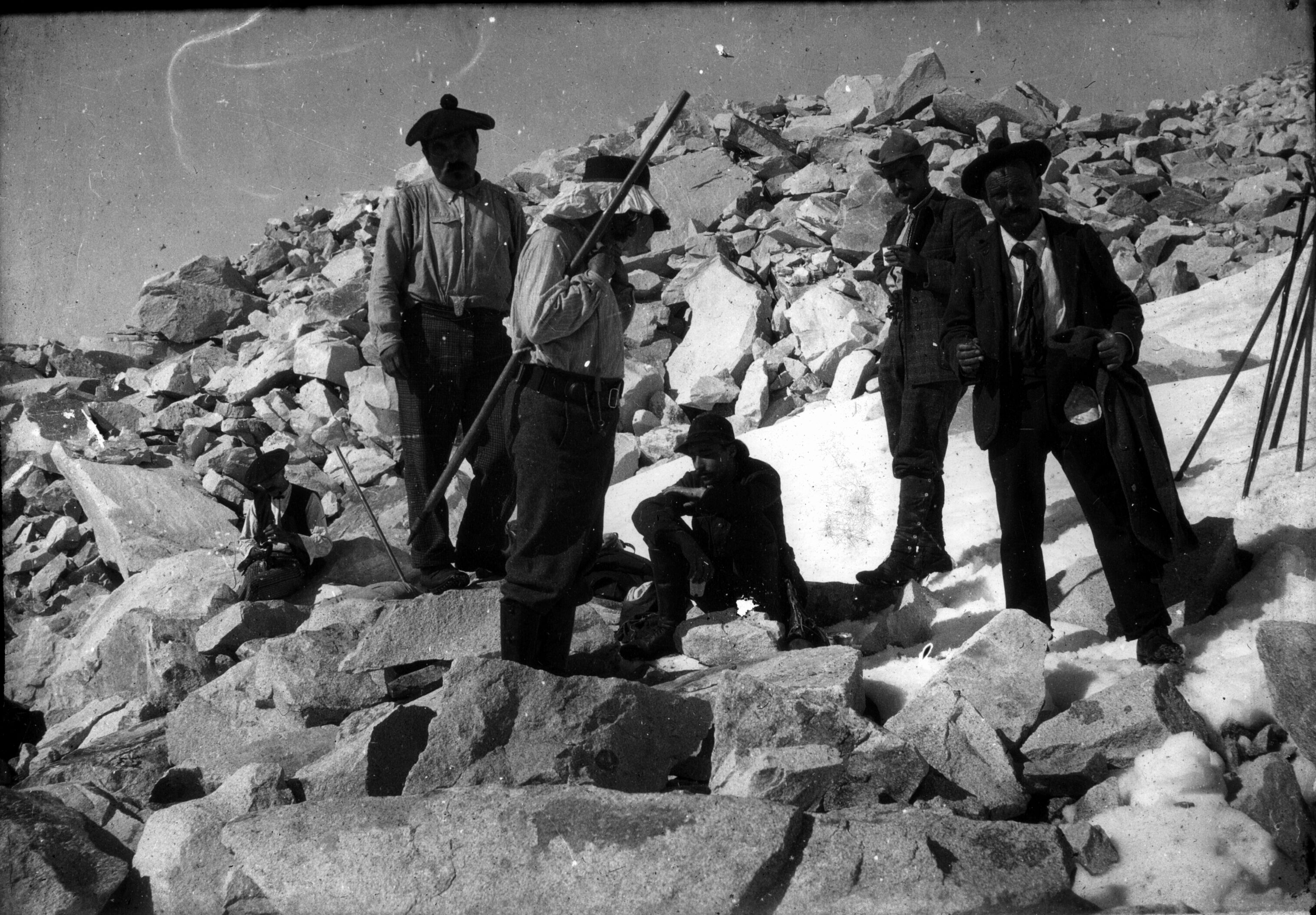 Fonds Trutat - Photographie ancienne Cote : TRU C 252 Localisation : Fonds ancien Original non communicable Titre : Moraine du Néthou, ascension Béraldi : Béraldi père et fils, Vives, Spont, Jean Angusto Auteur : Trutat, Eugène Rôle de l’auteur : Photographe Lieu de création : Ribagorza (Huesca ; comarque) Date de création : : 1900 [?] Mesures : 10 x 7 cm Mot(s)-clé(s) : -- Montagne -- Moraine -- Homme -- Alpinisme -- Guide de montagne -- Béret -- Chapeau -- Chemise -- Piolet -- En pied -- Assis -- Repos -- Béraldi, Henri -- Béraldi, fils -- Spont, Marcel. [?] -- Spont, Henri. [?] -- Vives -- Angusto, Jean -- Ribagorza (Huesca ; comarque) -- Maladeta, Massif de la (Espagne) -- Montes Malditos (Espagne) -- Aneto (Espagne ; pic) -- Esera (Espagne ; haute vallée) -- 20e siècle, 1e quart Médium : Photographies -- Noir et blanc -- Positifs au collodion sur plaque de verre -- Portraits de groupe Voir : TRU C 253 Au pied du pic du Milieu, Béraldi, 1900 Bibliothèque de Toulouse. Domaine public